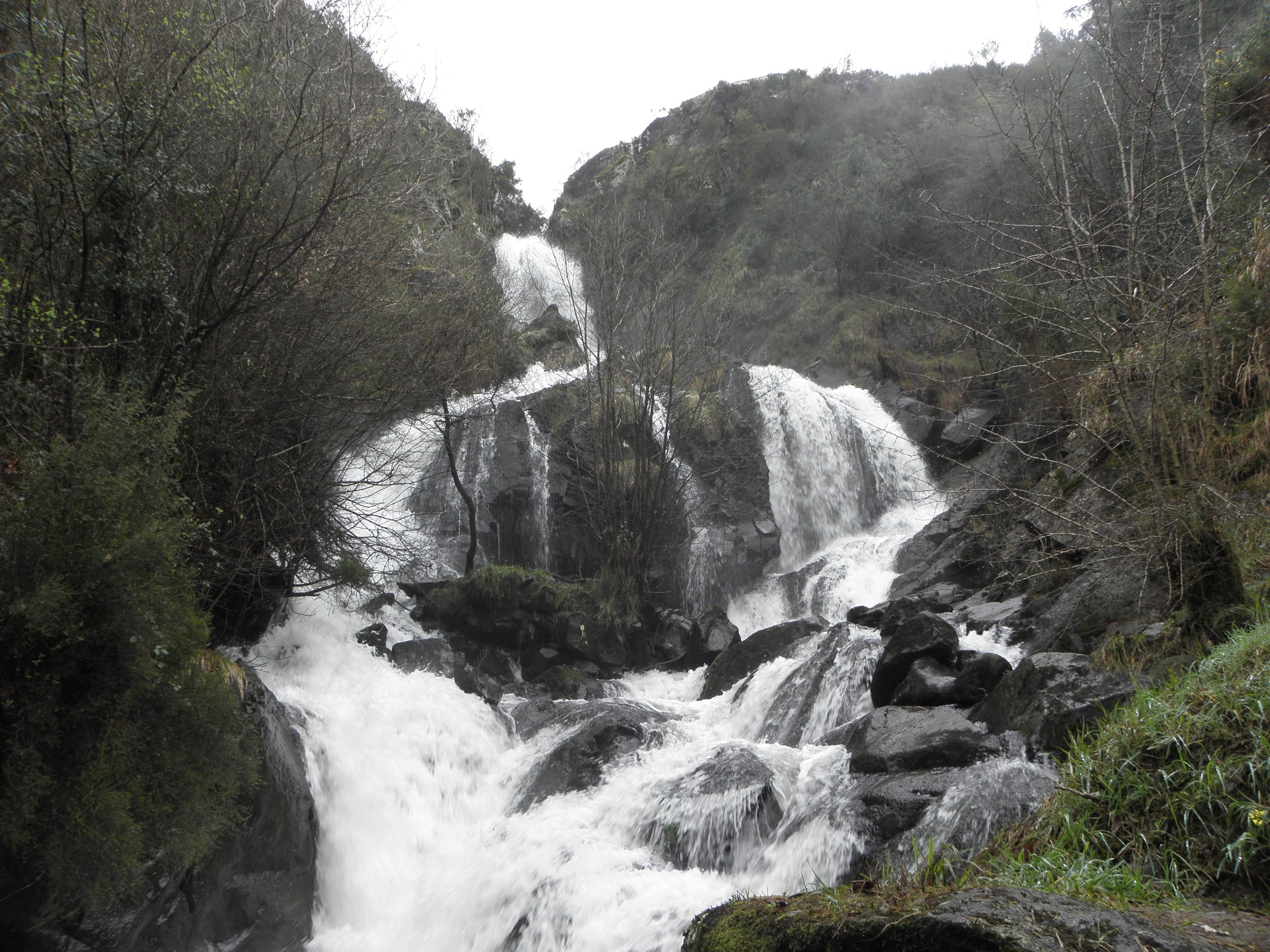 Fervenza de Entrecruces, Carballo.